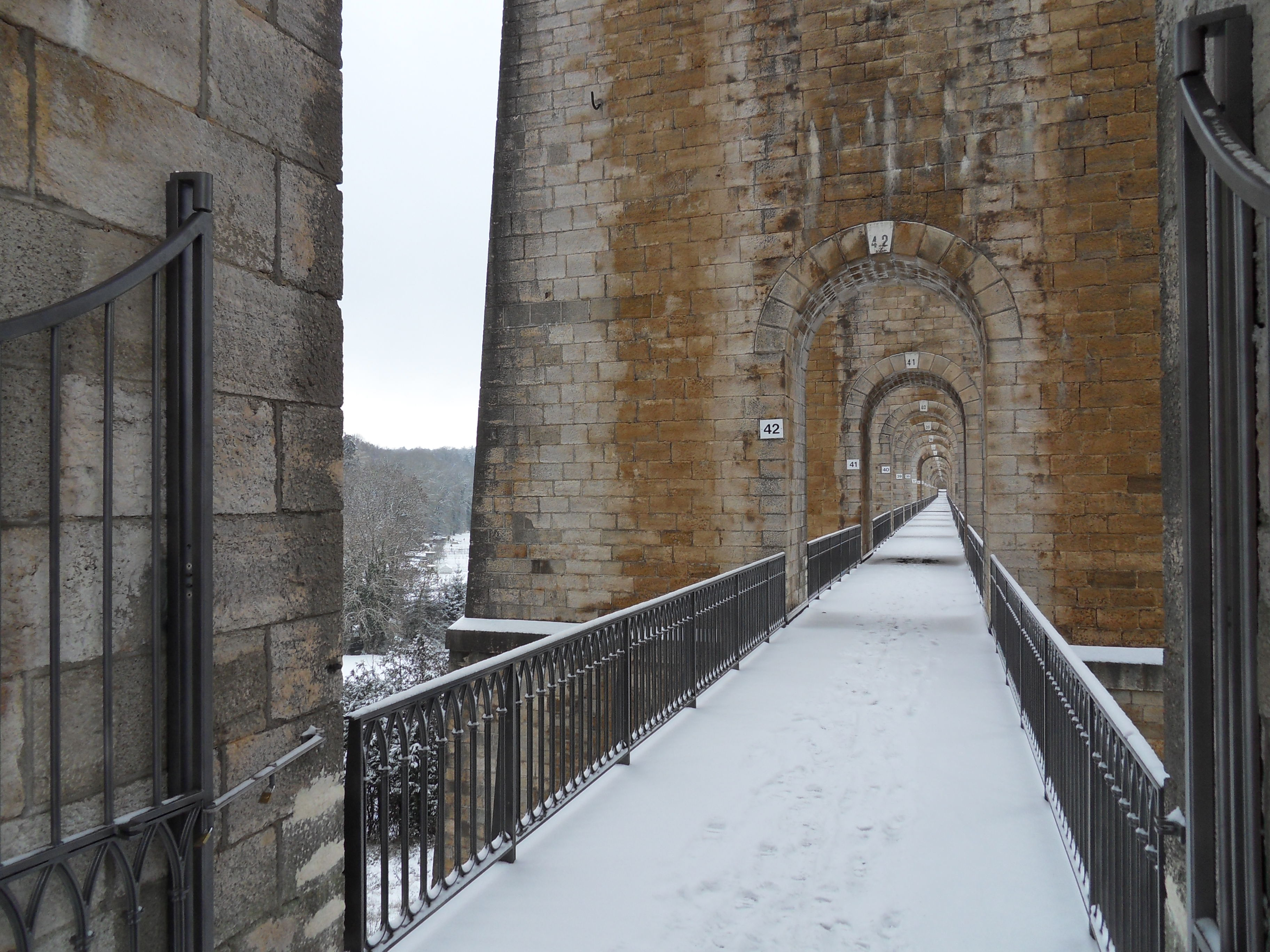 Viaduc de Chaumont, Champagne-Ardenne, France Samsung digital camera